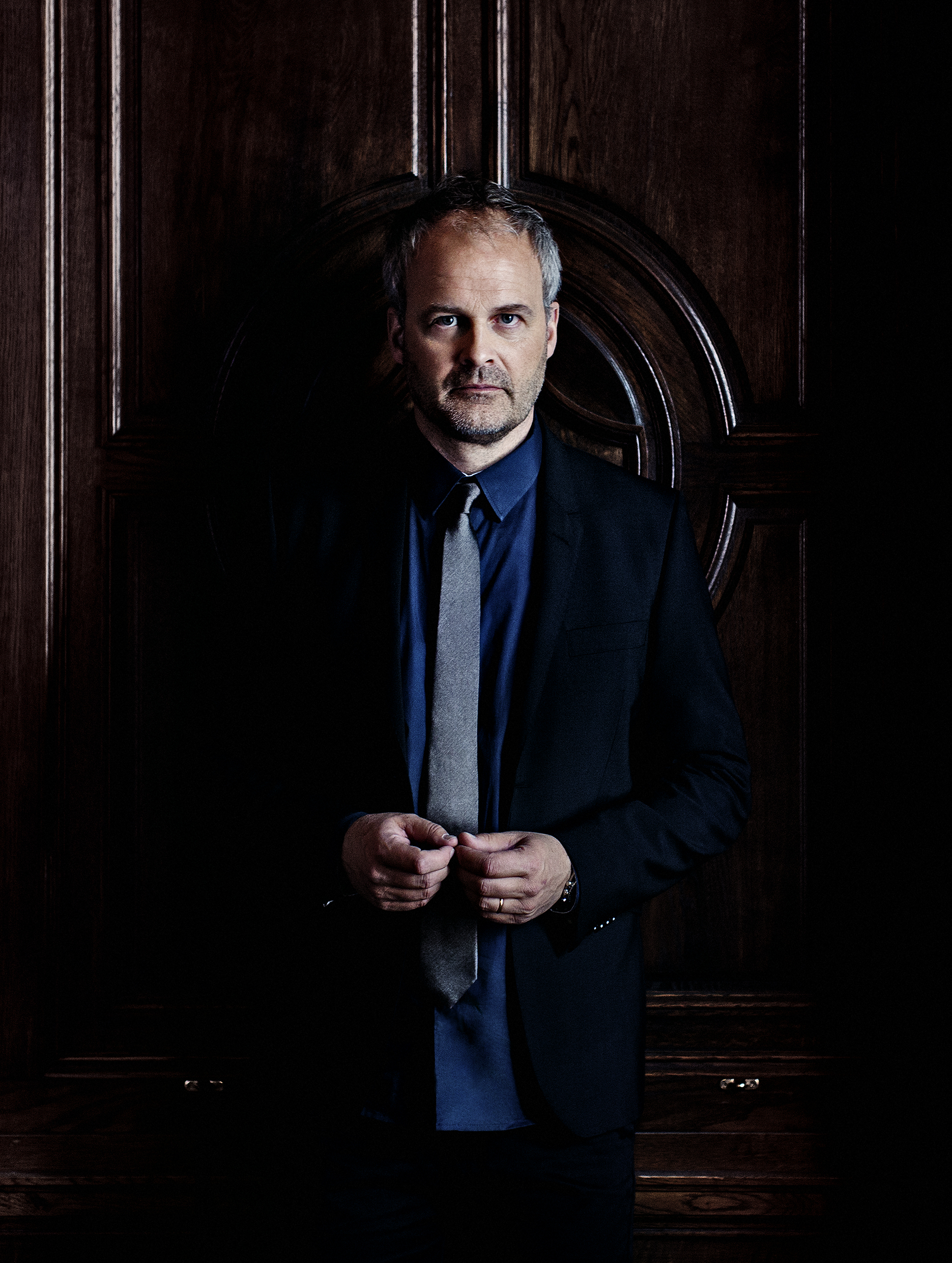 Skådespelaren och manusförfattaren Johan Rheborg.